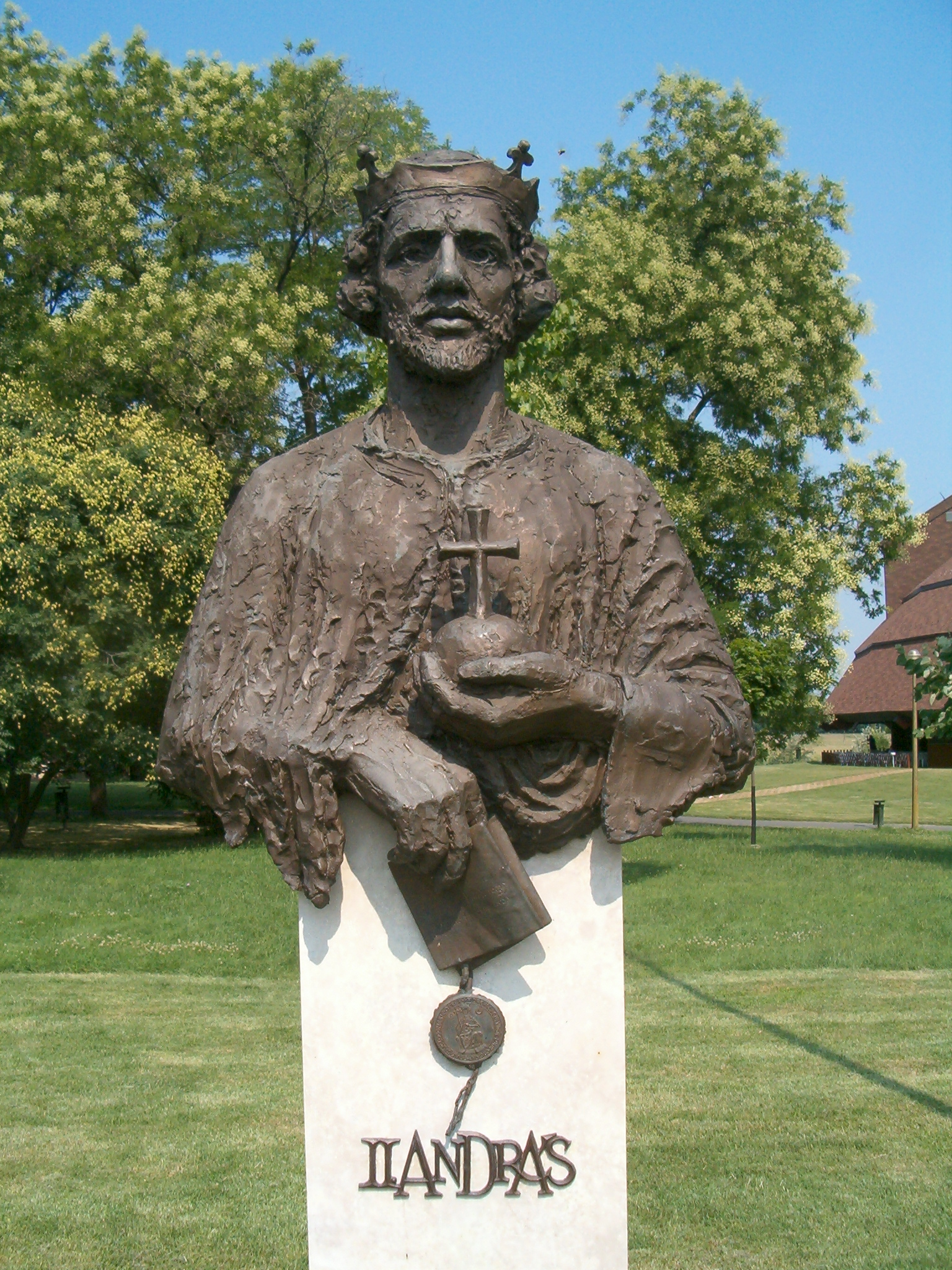 II. András király Nemzeti Történeti Emlékpark / National Historical Memorial Park in Ópusztaszer, Hungary (Tóth Béla alkotása) self shot photo (2005), Váradi Zsolt